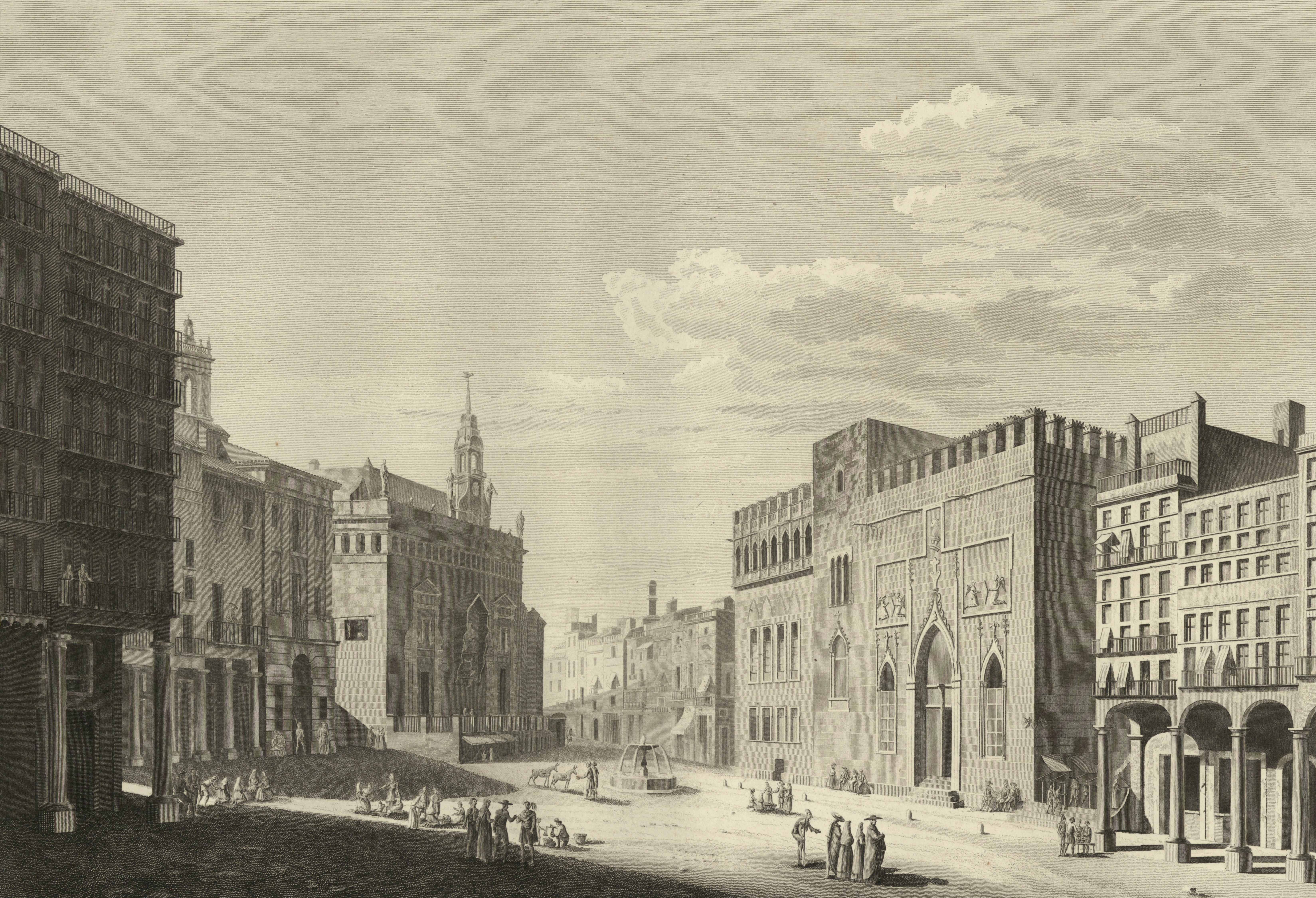 Marktplatz Valencia ca. 1811